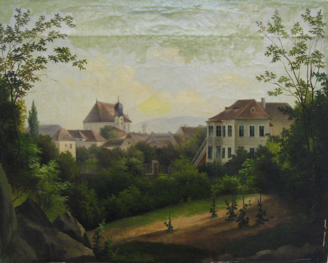 Alte Ansicht von Währing. Die Kirche St. Gertrud - 1753 an Stelle der schon 1232 urkundlich erstmal bezeugten Gertrudenkapelle erbaut - hat noch ihren alten Kirchturm. Er mußte 1858 abgebrochen werden, an seine Stelle kam der jetzige Westturm, von Baumeister Johann Höhne errichtet.